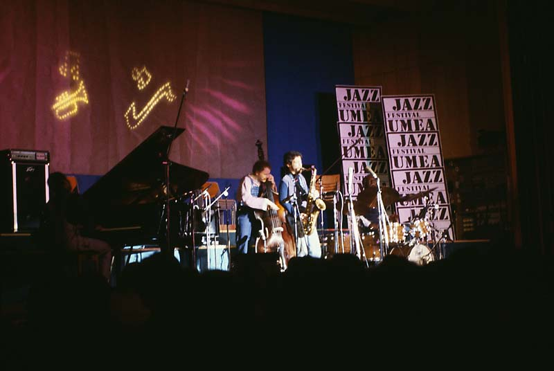 The Jazz Messengers på Umeå jazzfestival.; Musik; Övrigt